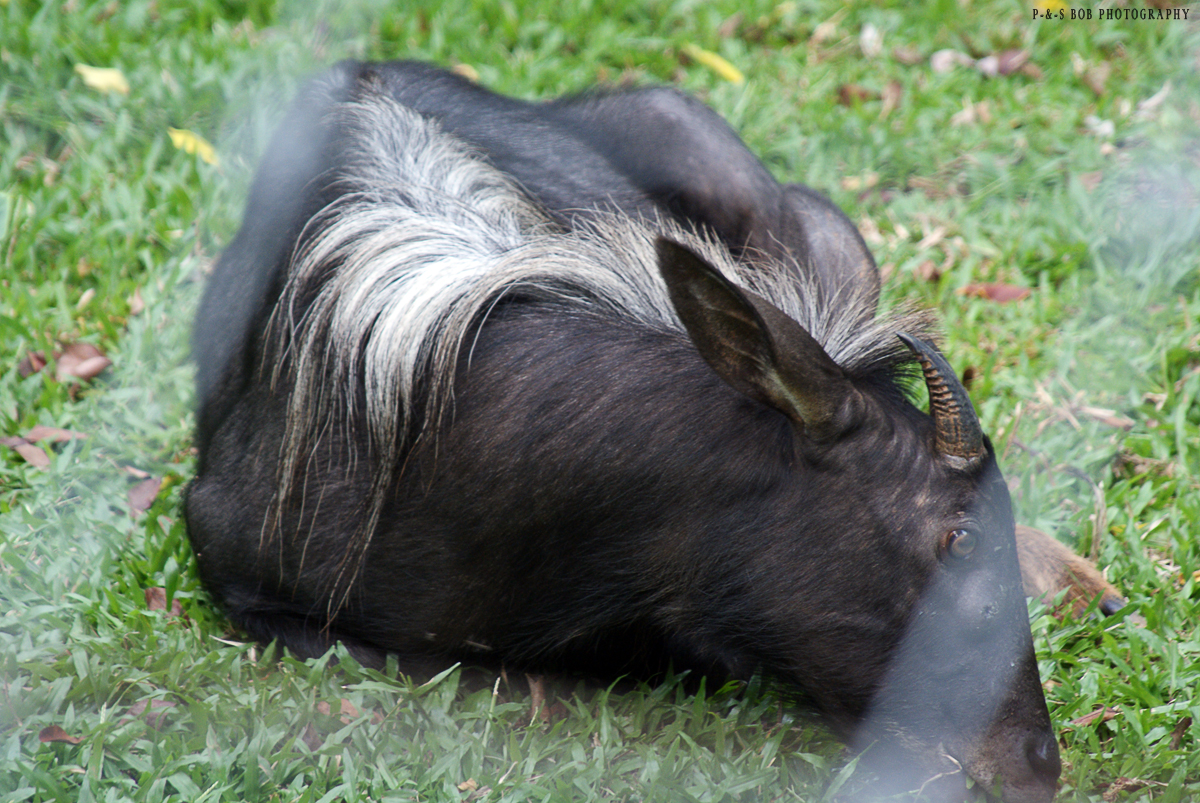 Kambing Gurun (in Malay) at Zoo Melaka, Malaysia.